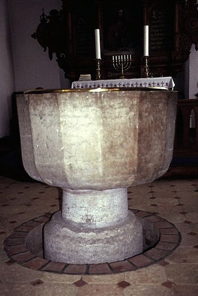 Aidt Kirke kalkstensdøbefonten.